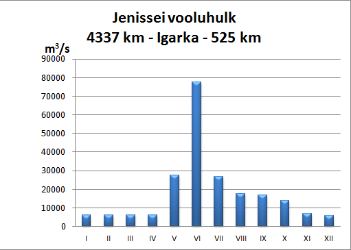 Hüdrograaf Jenisei